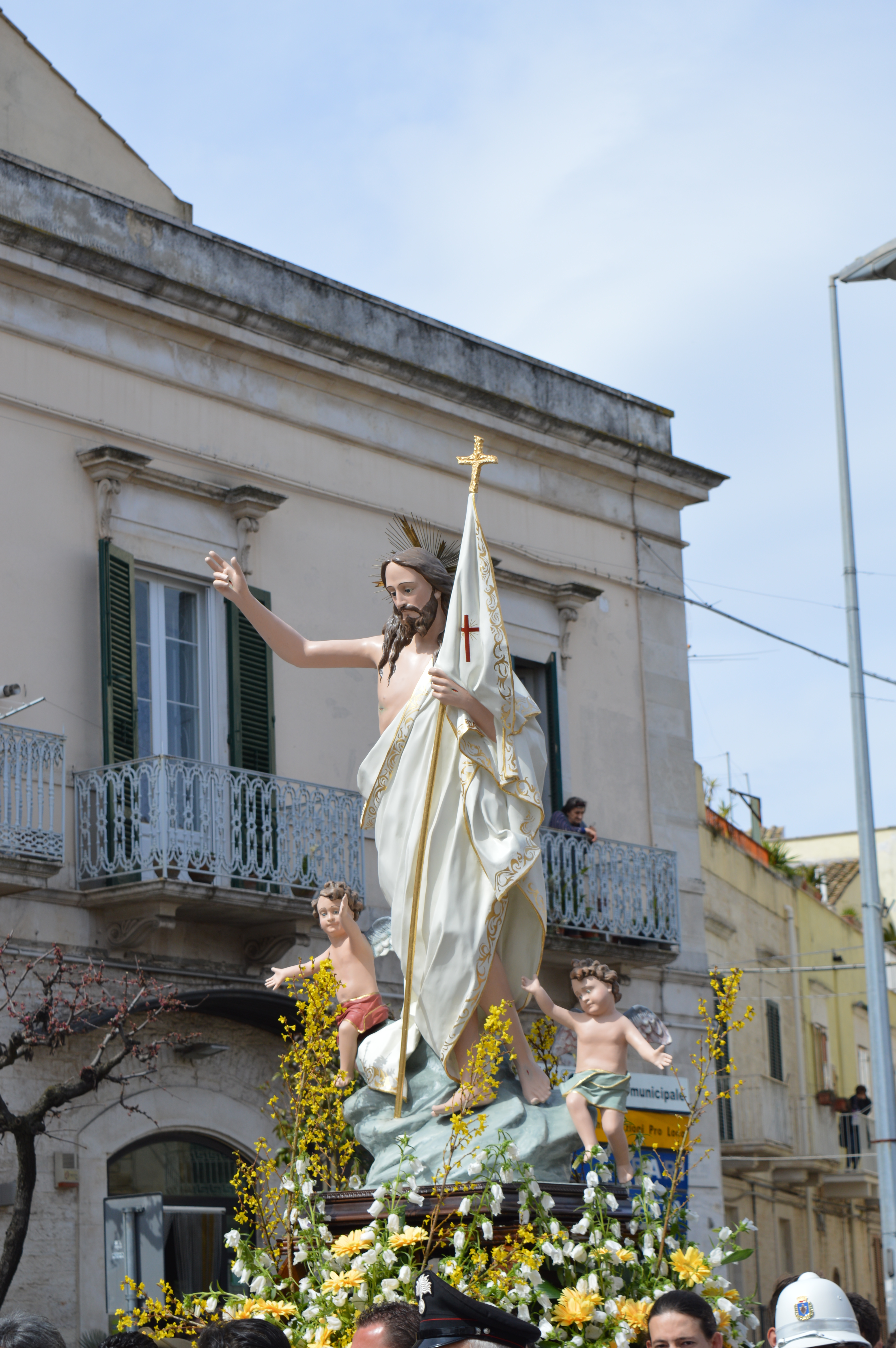 Gesù risorto